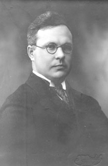 Gerhard Rägo